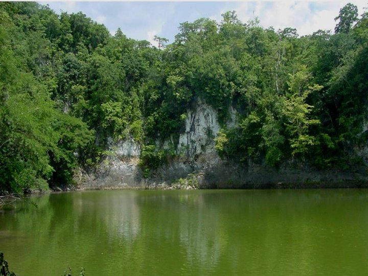 Cenote "Yaax Ha", en la población de Santo Tomás, municipio de Tenosique, estado mexicano de Tabasco. Es uno de los dos únicos cenotes descubiertos hasta ahora en Tabasco.